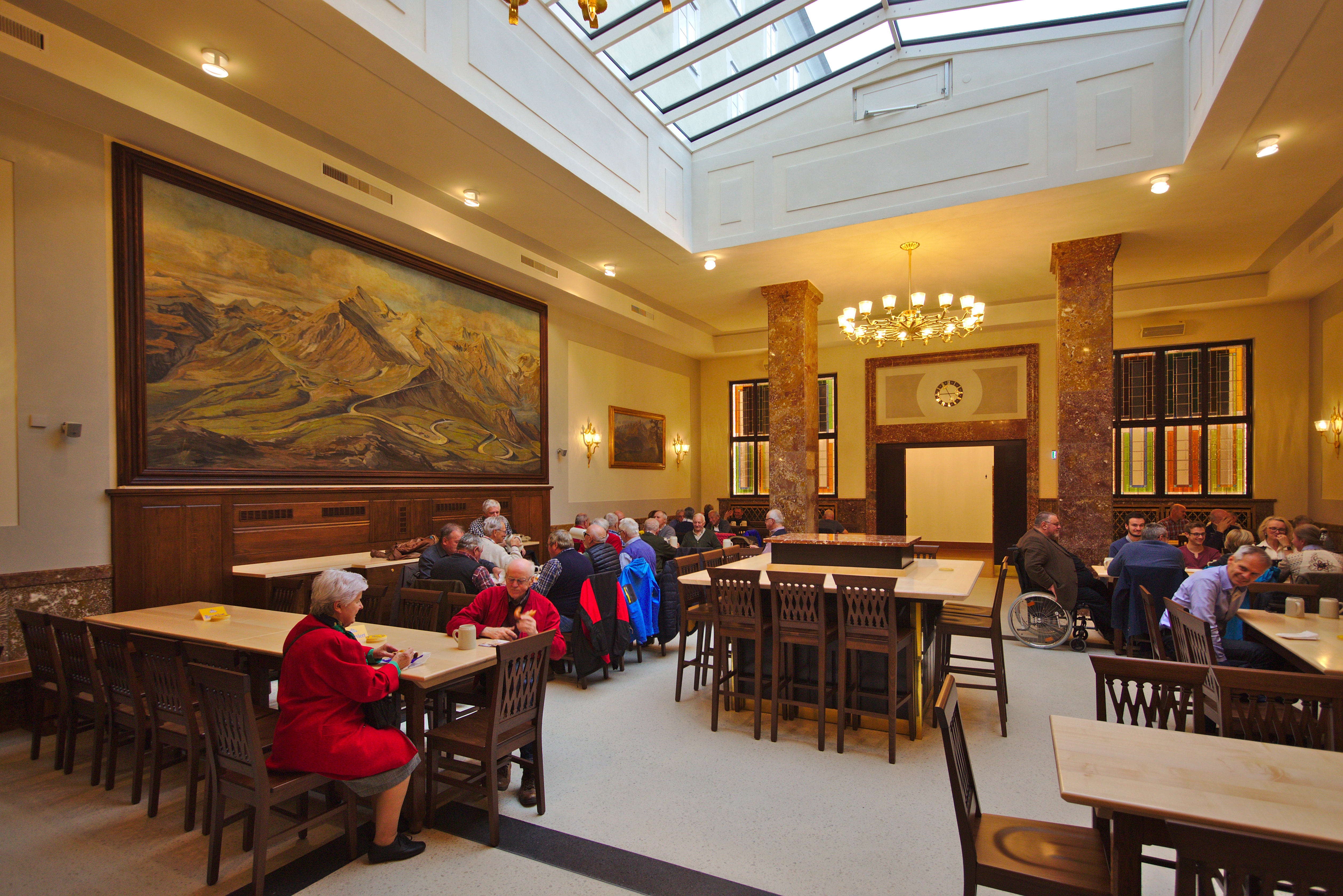 Augustinerbräu Mülln: Marmorsaal alias Abt-Nicolaus-Saal